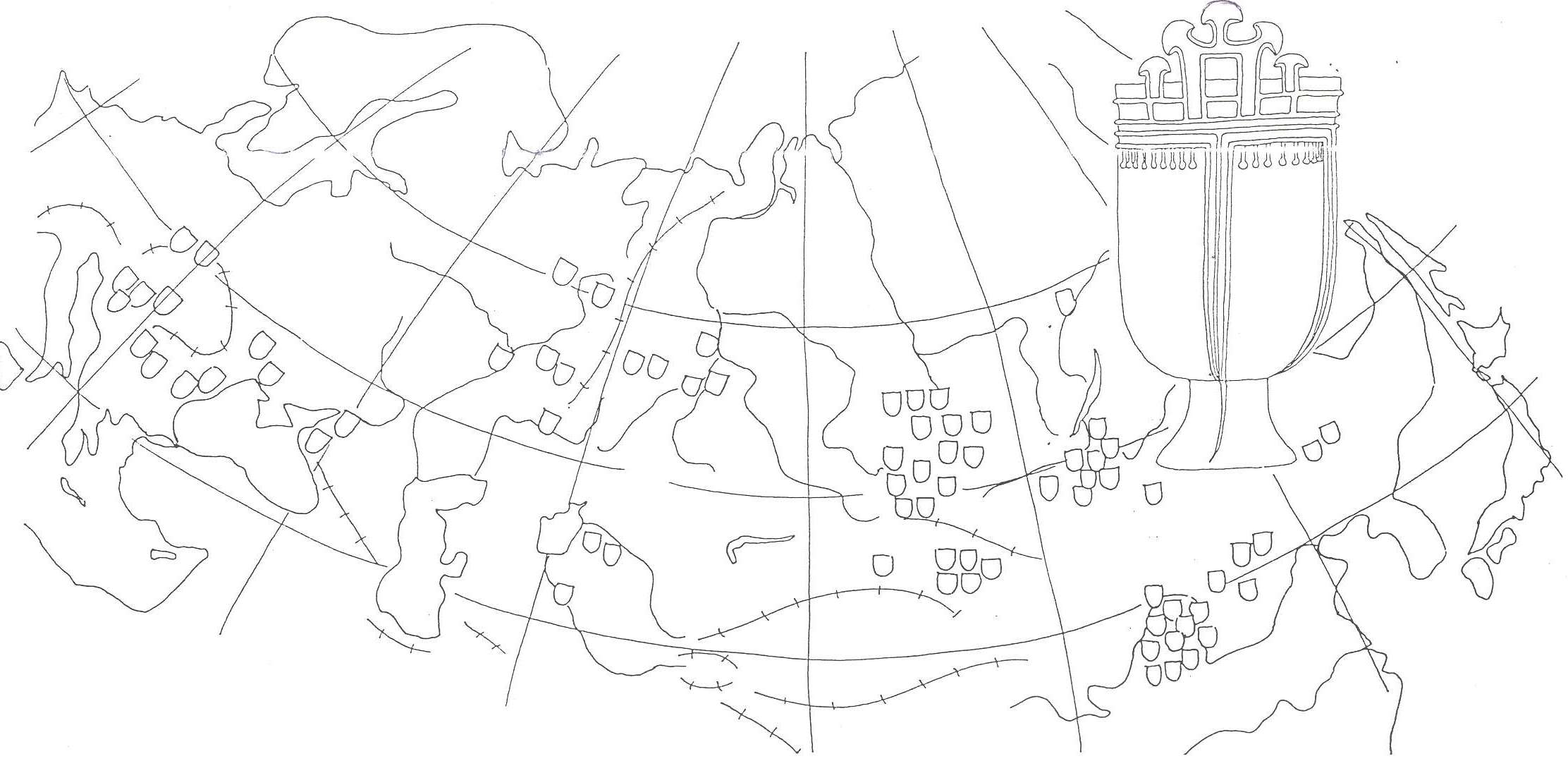 A hun üstök elterjedése Eurázsiában